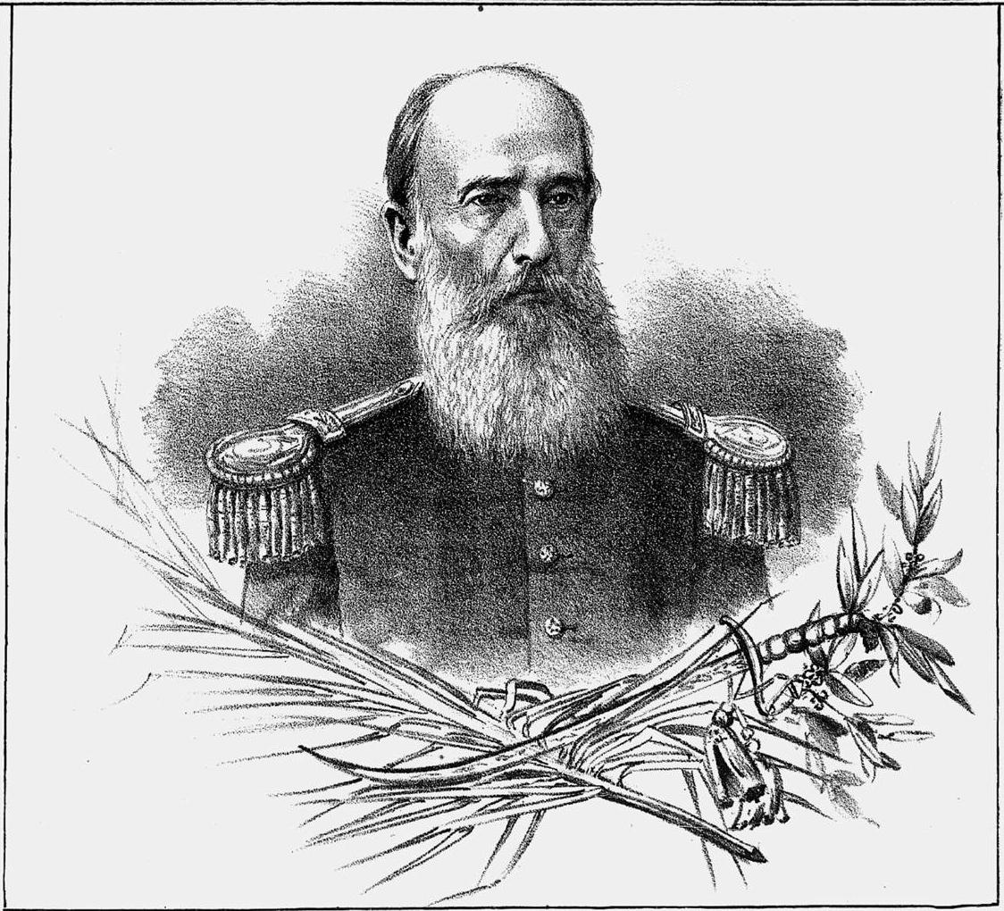 José Antônio Correia da Câmara, Visconde de Pelotas